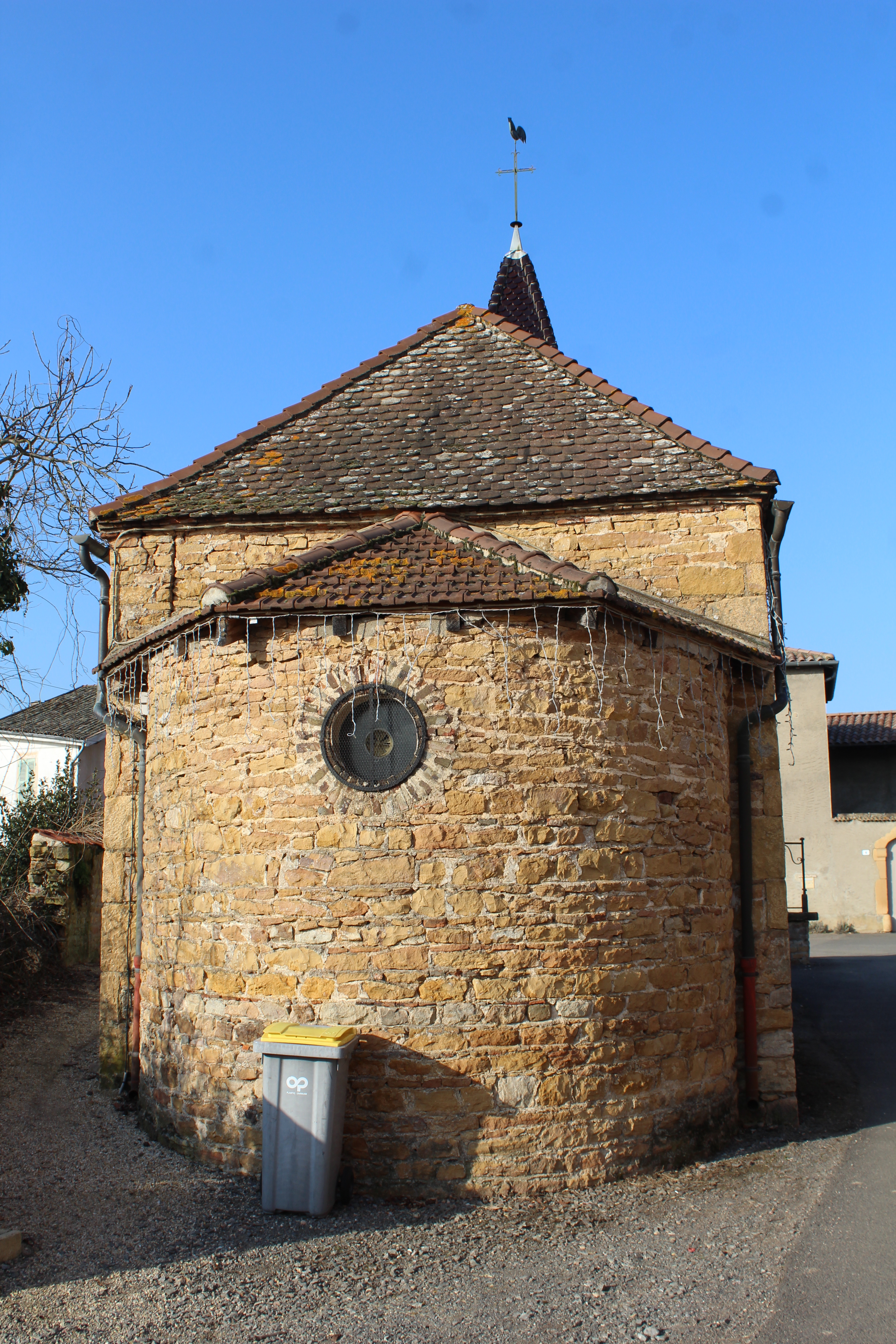 Chapelle Saint-Roch située à Dracé-lès-Ollières, hameau de Crêches-sur-Saône.